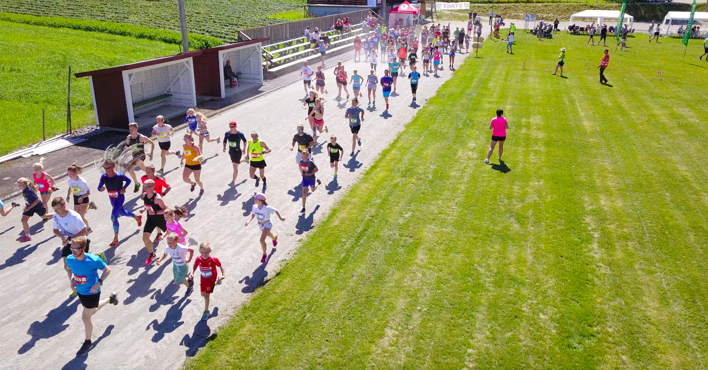 Fra starten i 2018